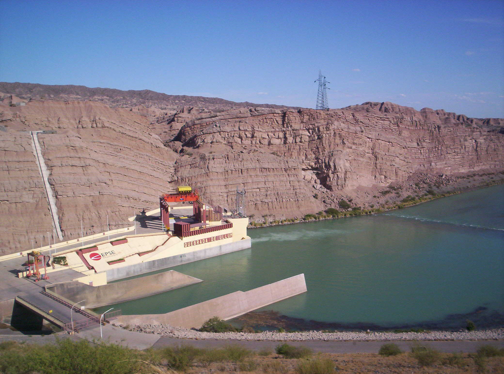 Fotografía de la Central y Quebrada de Ullum, provincia de San Juan, Argentina